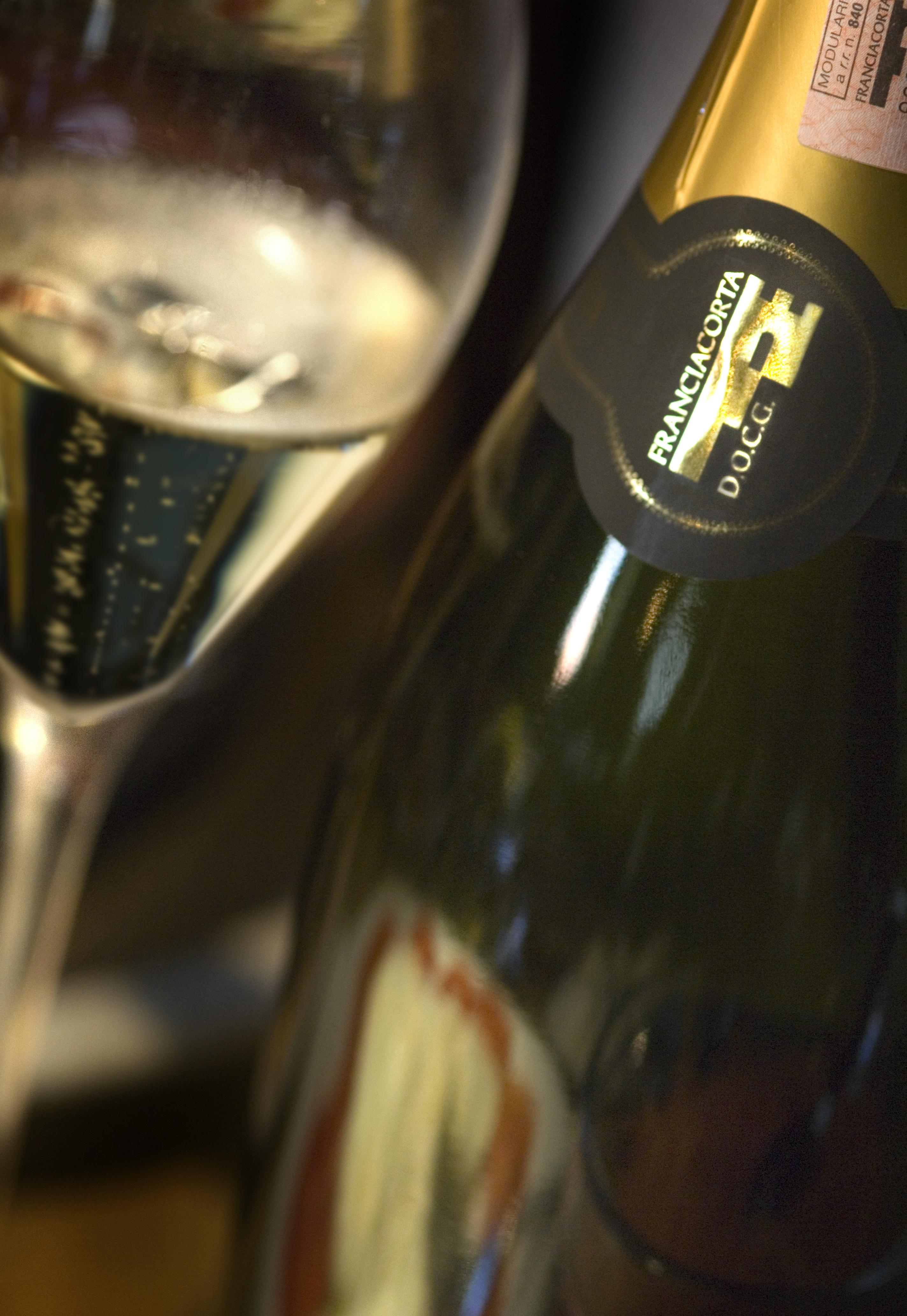 bottiglia e calice di franciacorta in primo piano